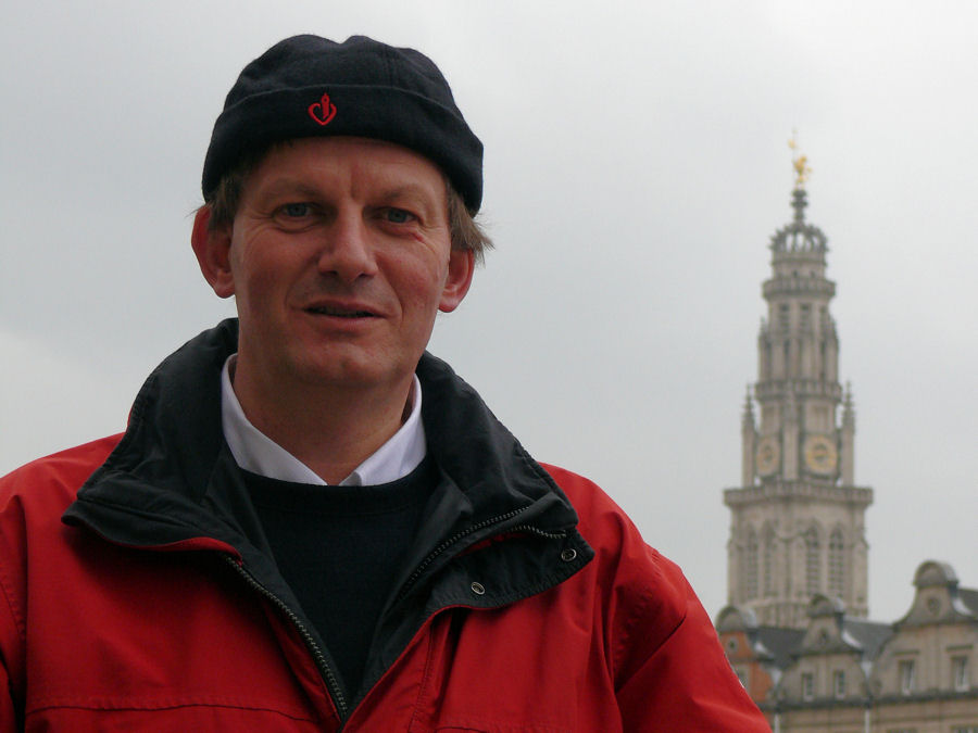 Photo de Dominique PLANCKE à Arras en septembre 2007